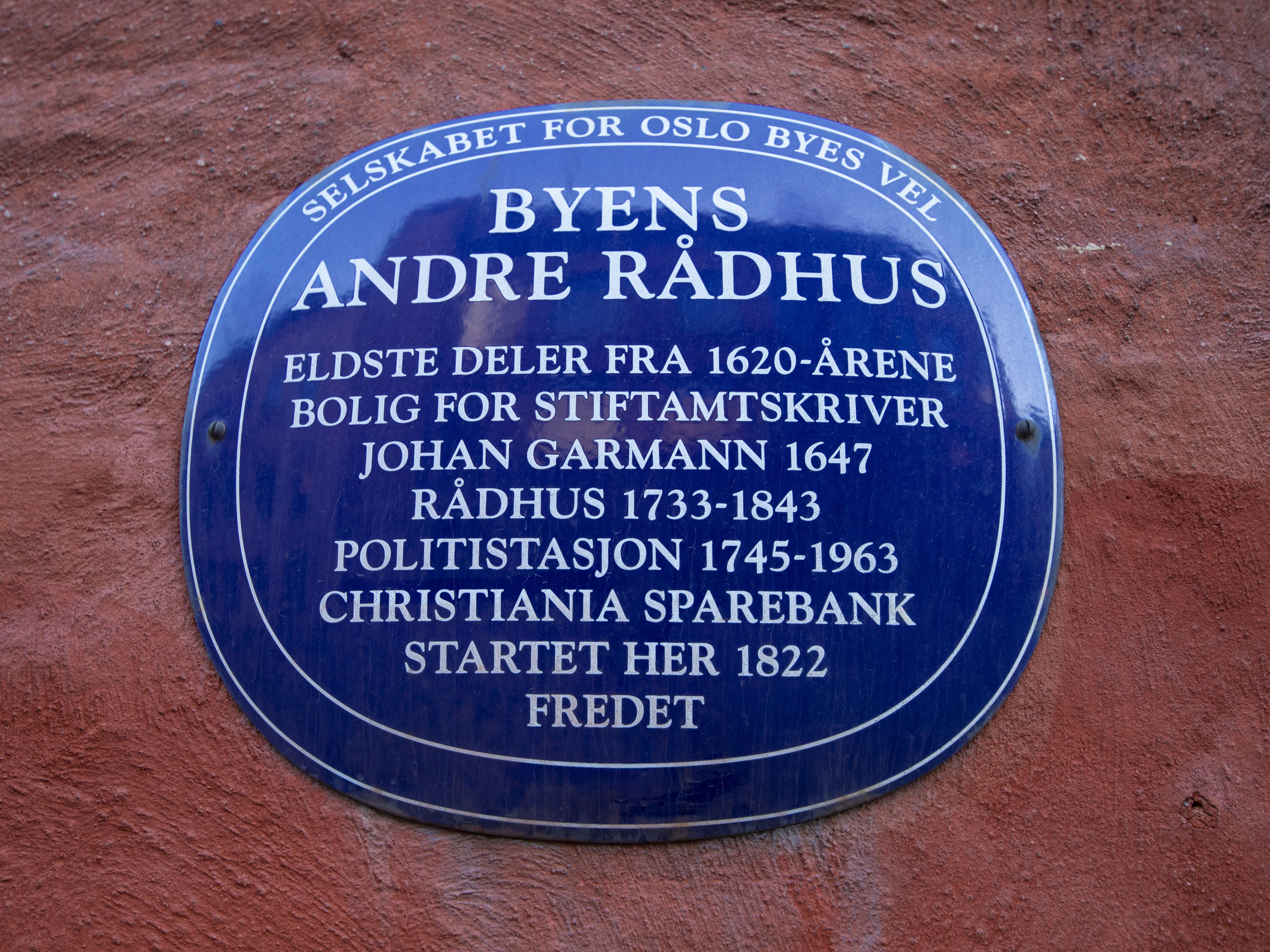 Blått skilt ved siden av inngangen til Rådhusgata 7